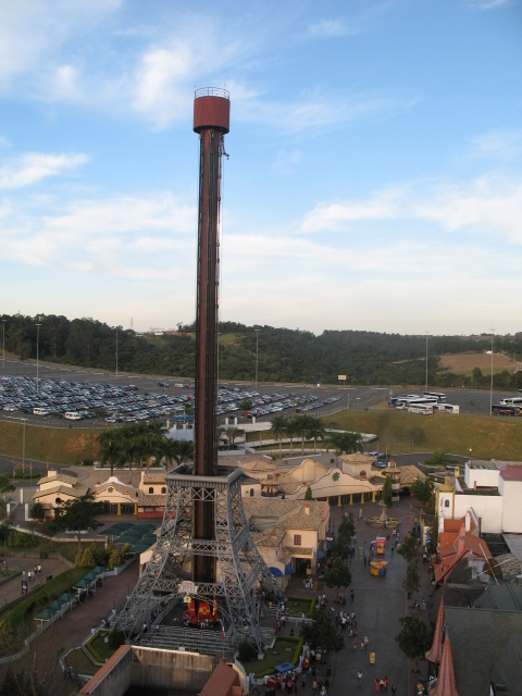 Atração "La Tour Eiffel" no parque temático Hopi Hari em Vinhedo, São Paulo, Brasil.